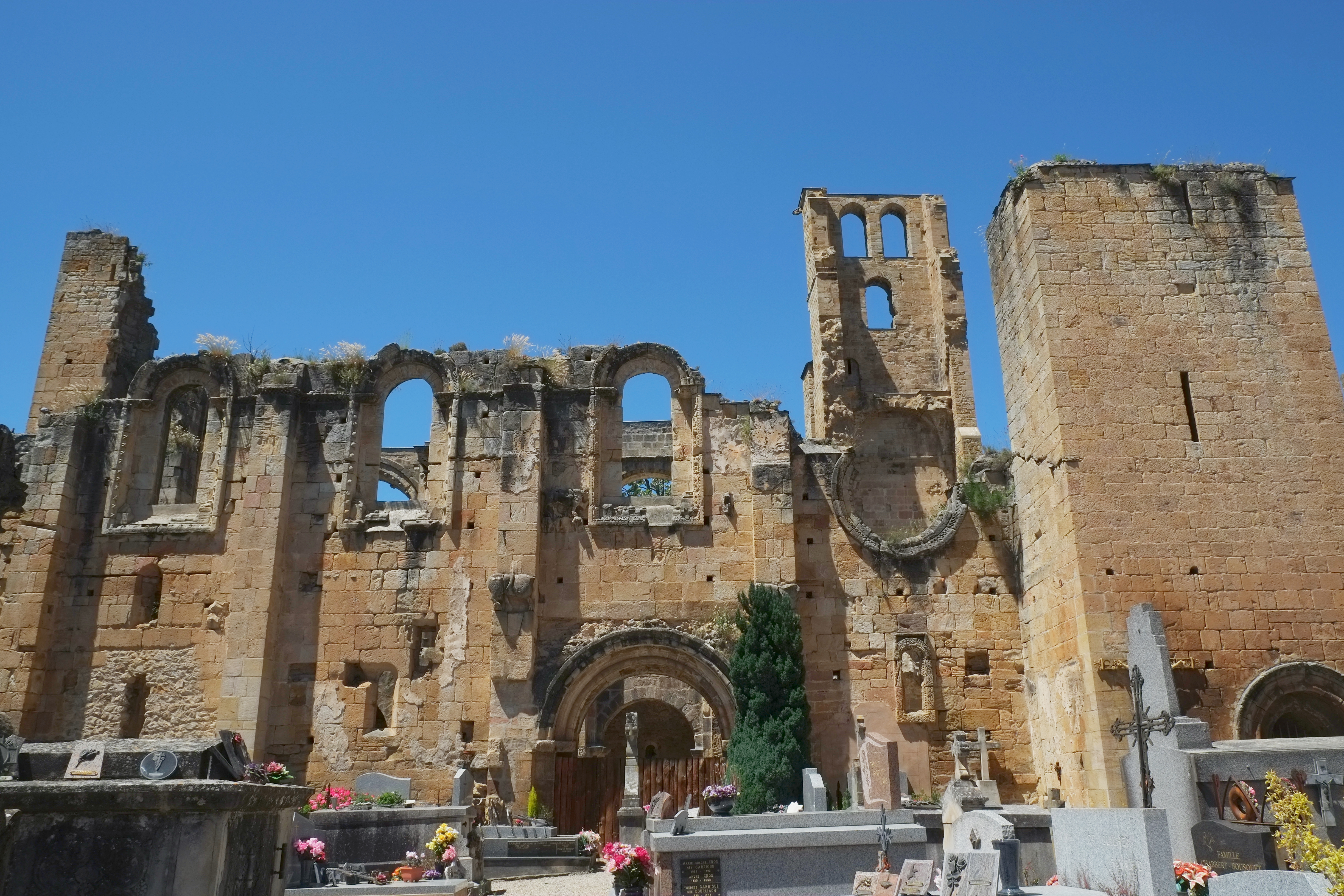 Ehemalige Abtei in Alet-les-Bains (Frankreich)